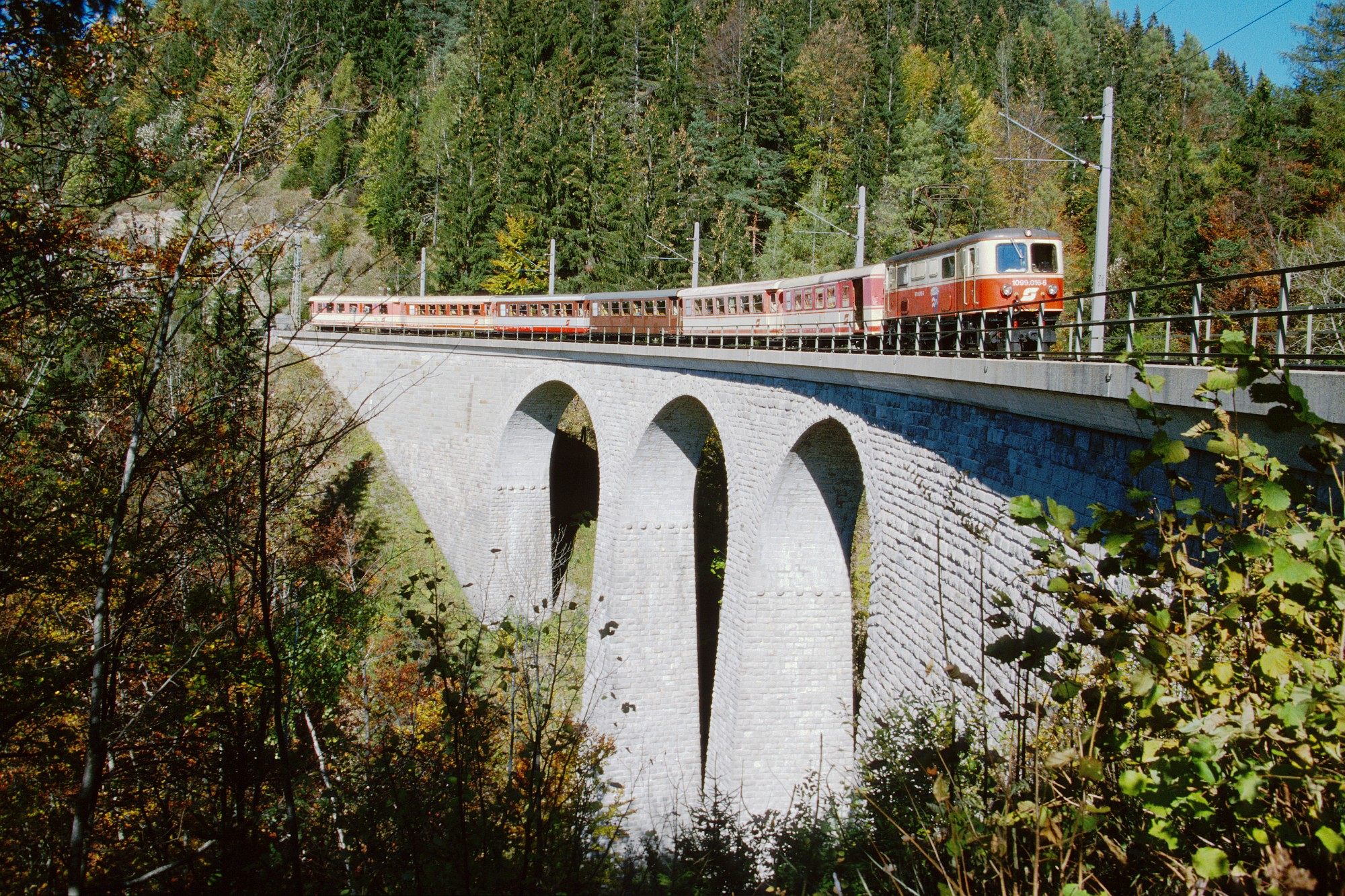 de: Zug der Mariazellerbahn mit Elektrolok der Reihe 1099 auf dem Saugrabenviadukt en: Train of the Mariazellerbahn with class 1099 electric engine passing the Saugraben viaduct